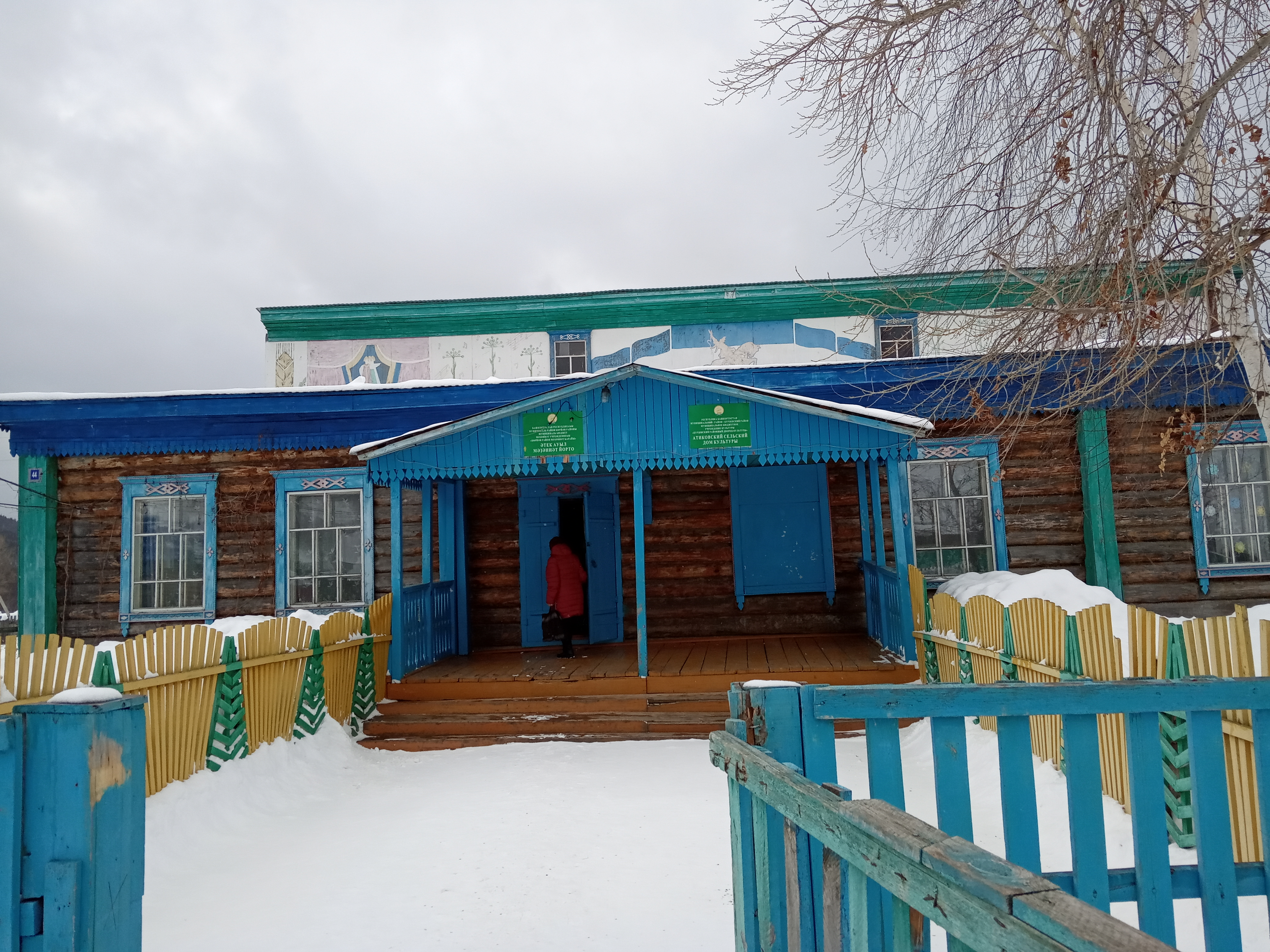 Сельский дом культуры деревни Атиково Бурзянского района